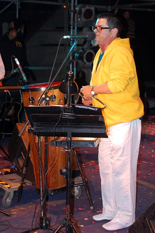 José Vasconcellos (nacido en Santiago de Chile en 1959) más conocido como Joe Vasconcellos, es un cantante y compositor chileno de rock latino, con claras influencias de la fusión latinoamericana y la música popular de Brasil. Es hijo de un diplomático brasileño y de una chilena.